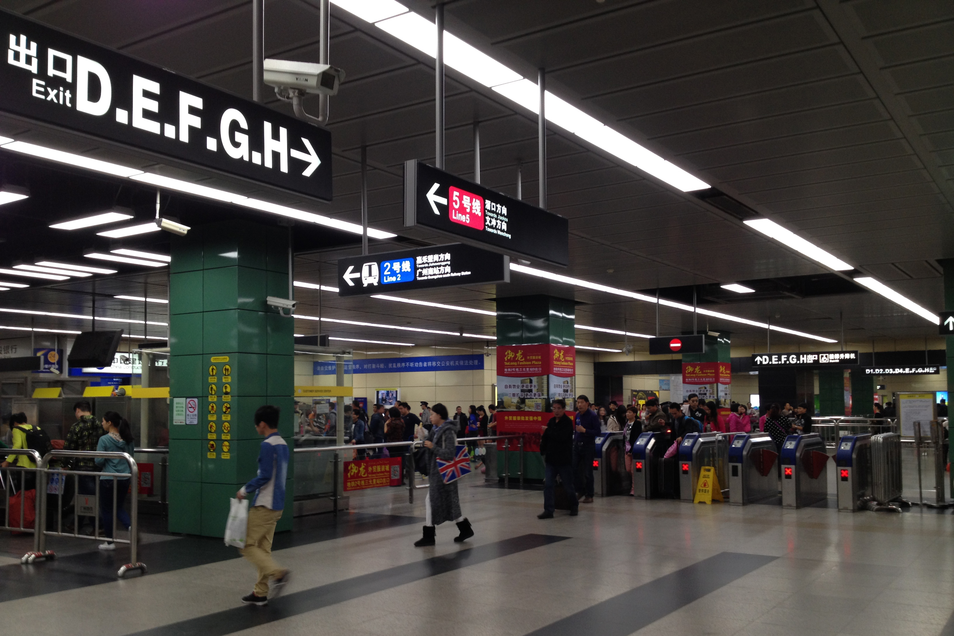 广州地铁2号线广州火车站站厅